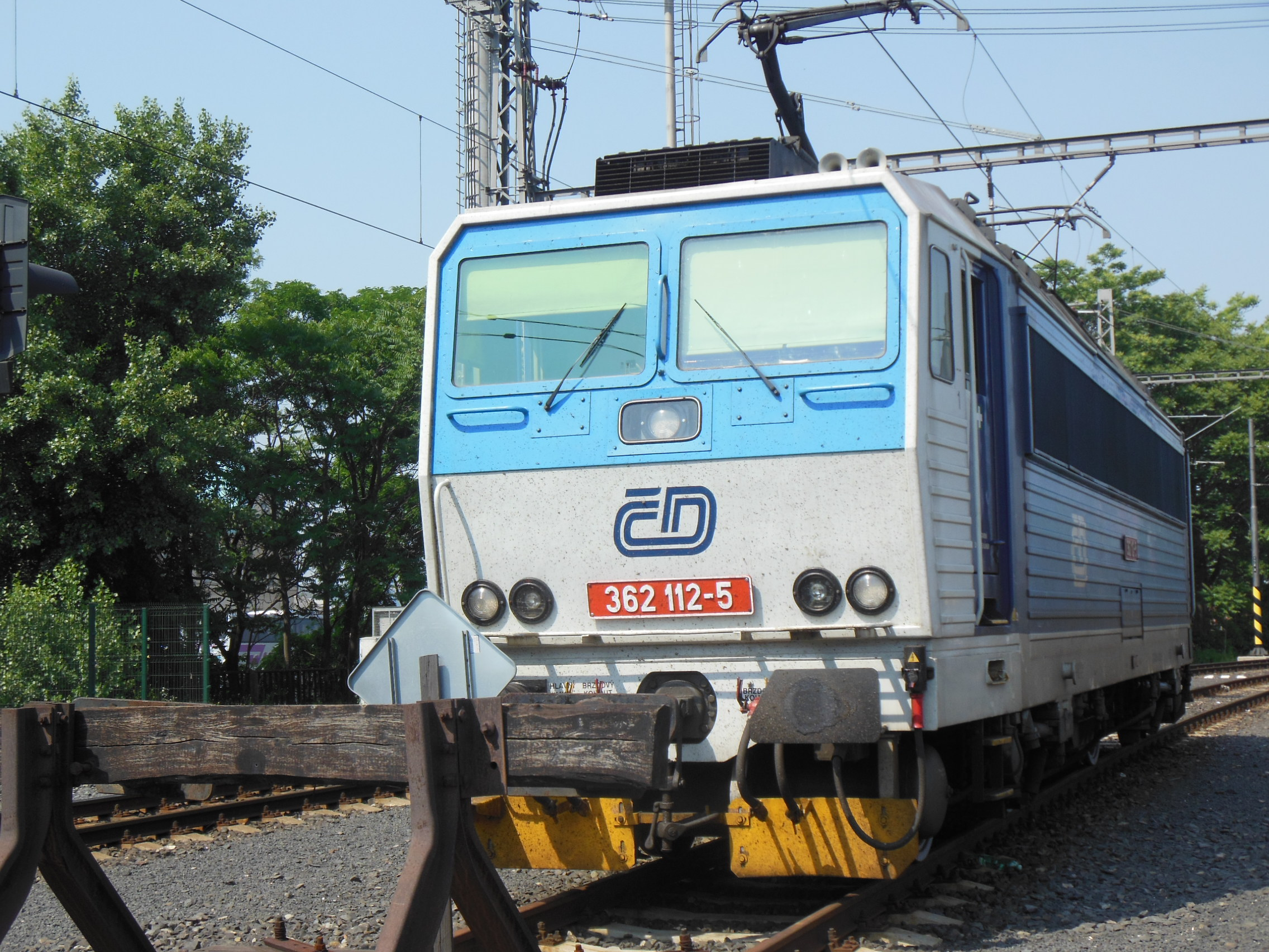 Elektrická lokomotiva 362 ČD na Hlavním nádraží v Praze.